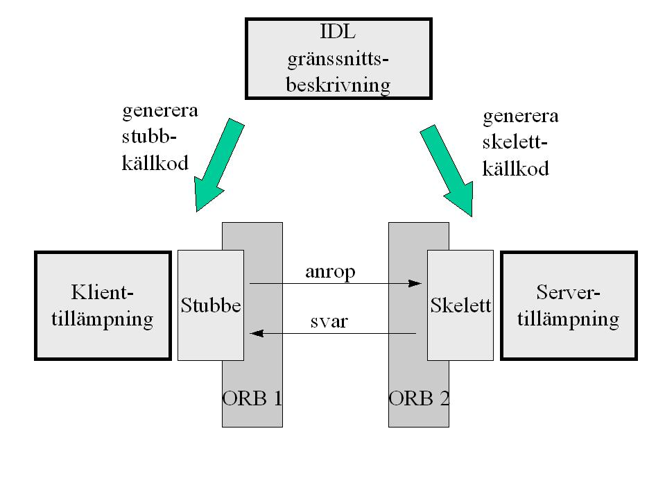 Översikt IDL och CORBA.